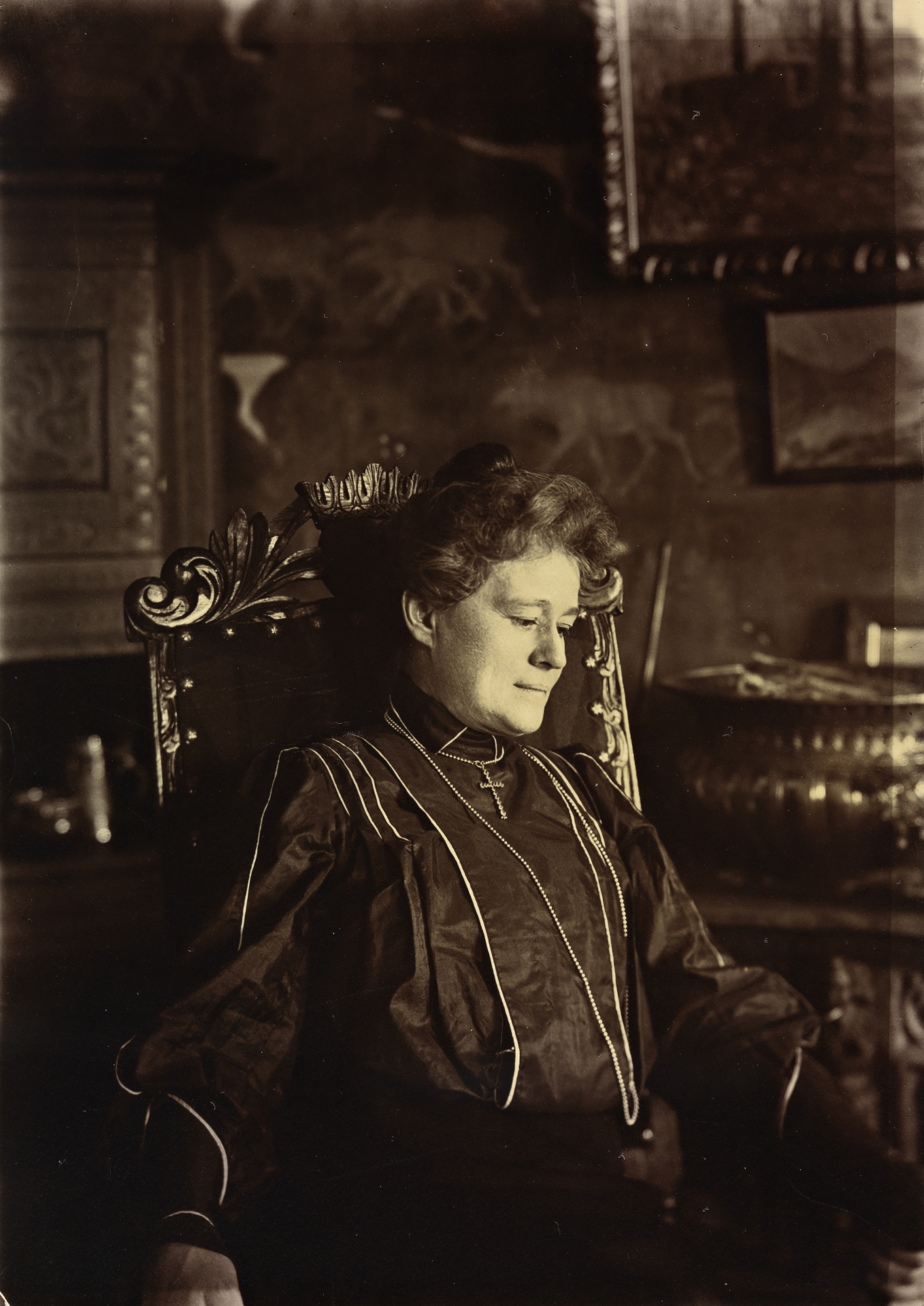 Ева Нансен (1858 - 1907) в гостиной усадьбы "Пульхёгда"